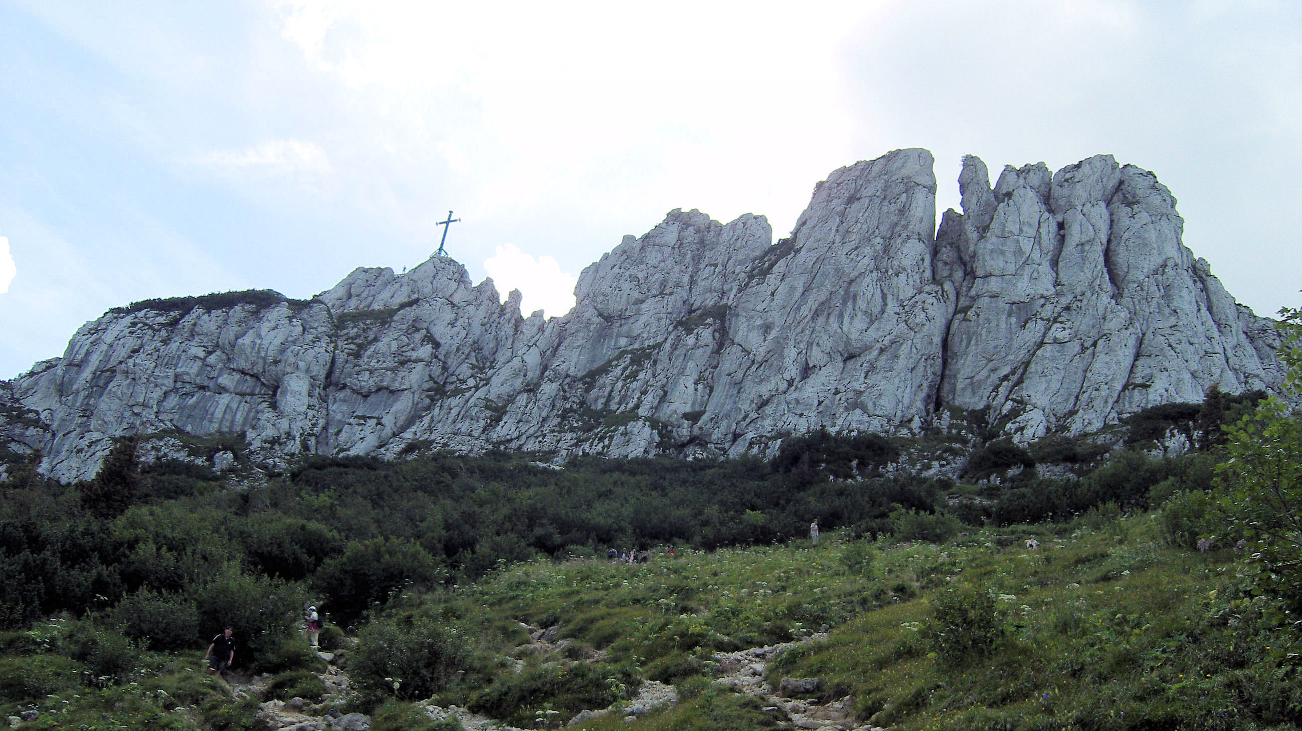 Kampenwand von der Seite eigenes Foto